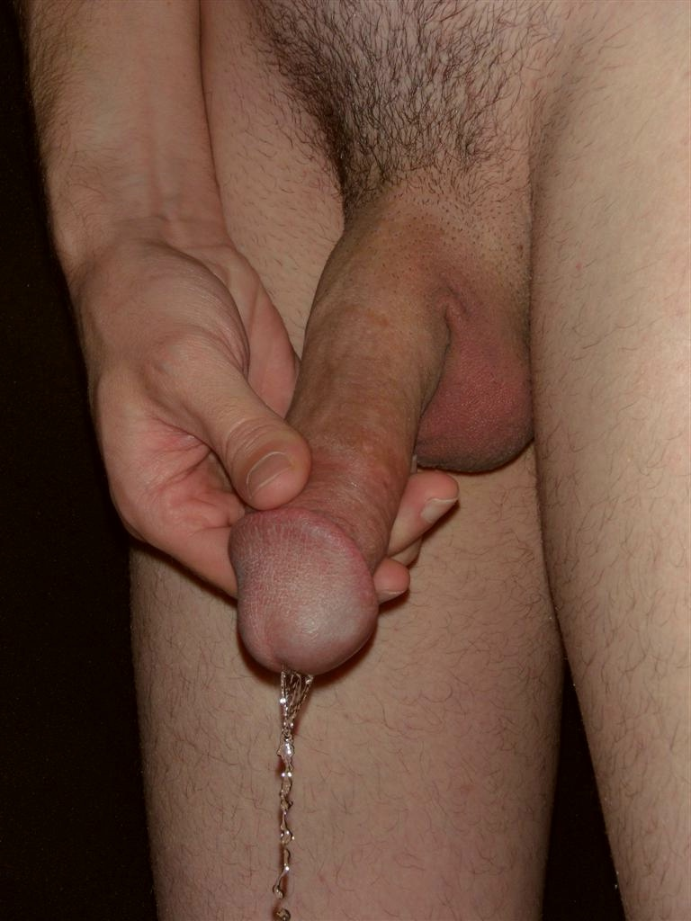 Male Urination